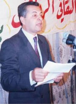 عدنان السيد حسين، وزير وأكاديمي لبناني، رئيس الجامعة اللبنانية. من مواليد العام 1954